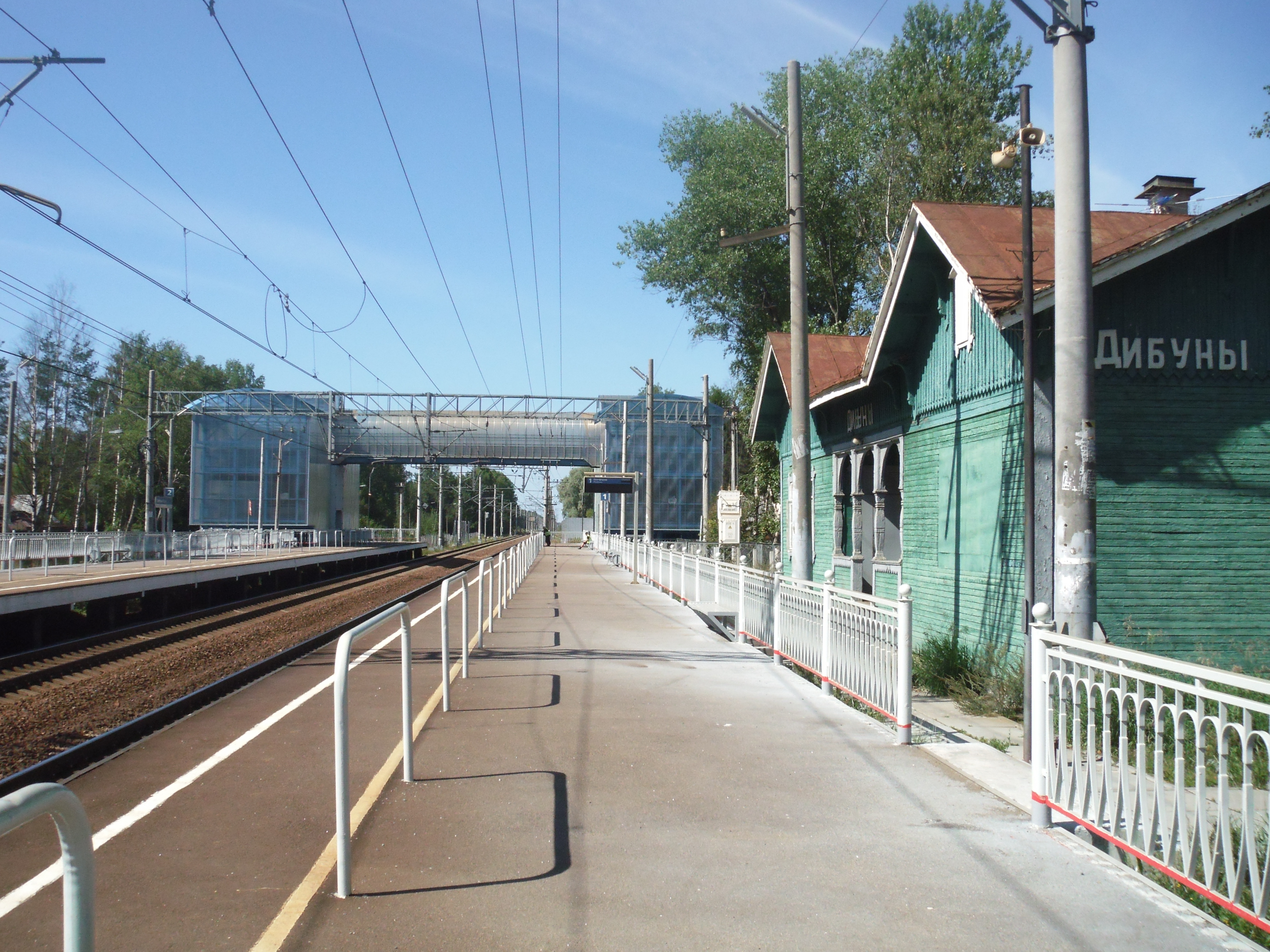 Дибуны СПб. Платформа с новым пешеходным переходом через ж.д.